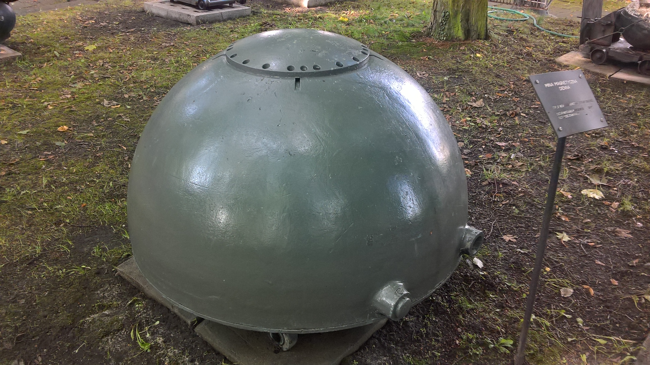 Niemiecka mina magnetyczna denna typ "G" eksponowana w Muzeum Marynarki Wojennej w Gdyni.